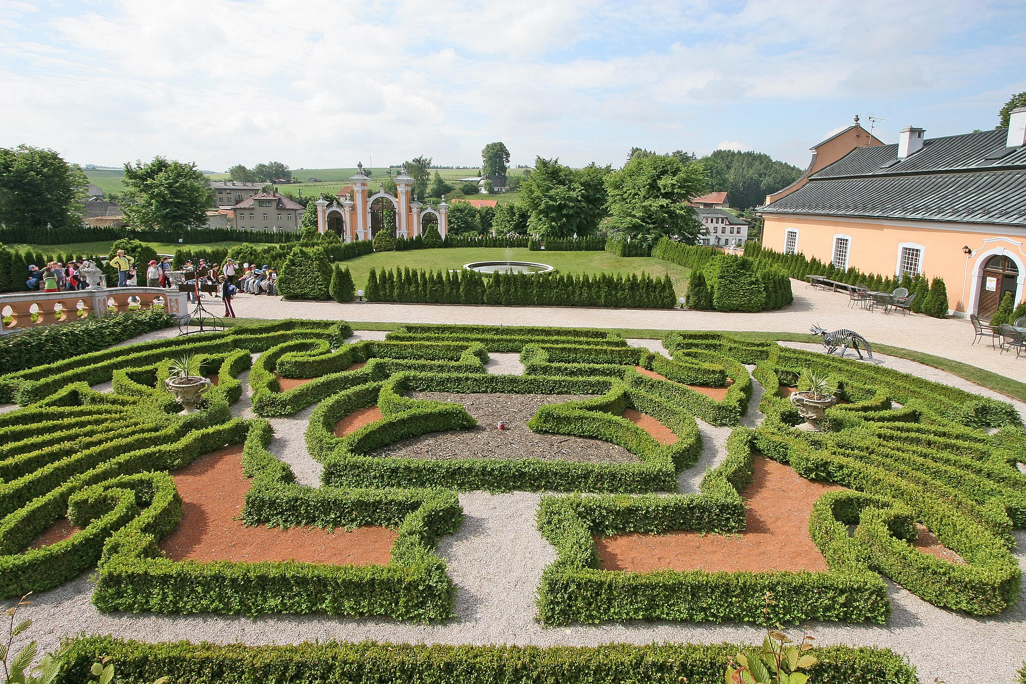 Nádvoří zámku Nové Hrady v okrese Ústí nad Orlicí (dříve Chrudim)